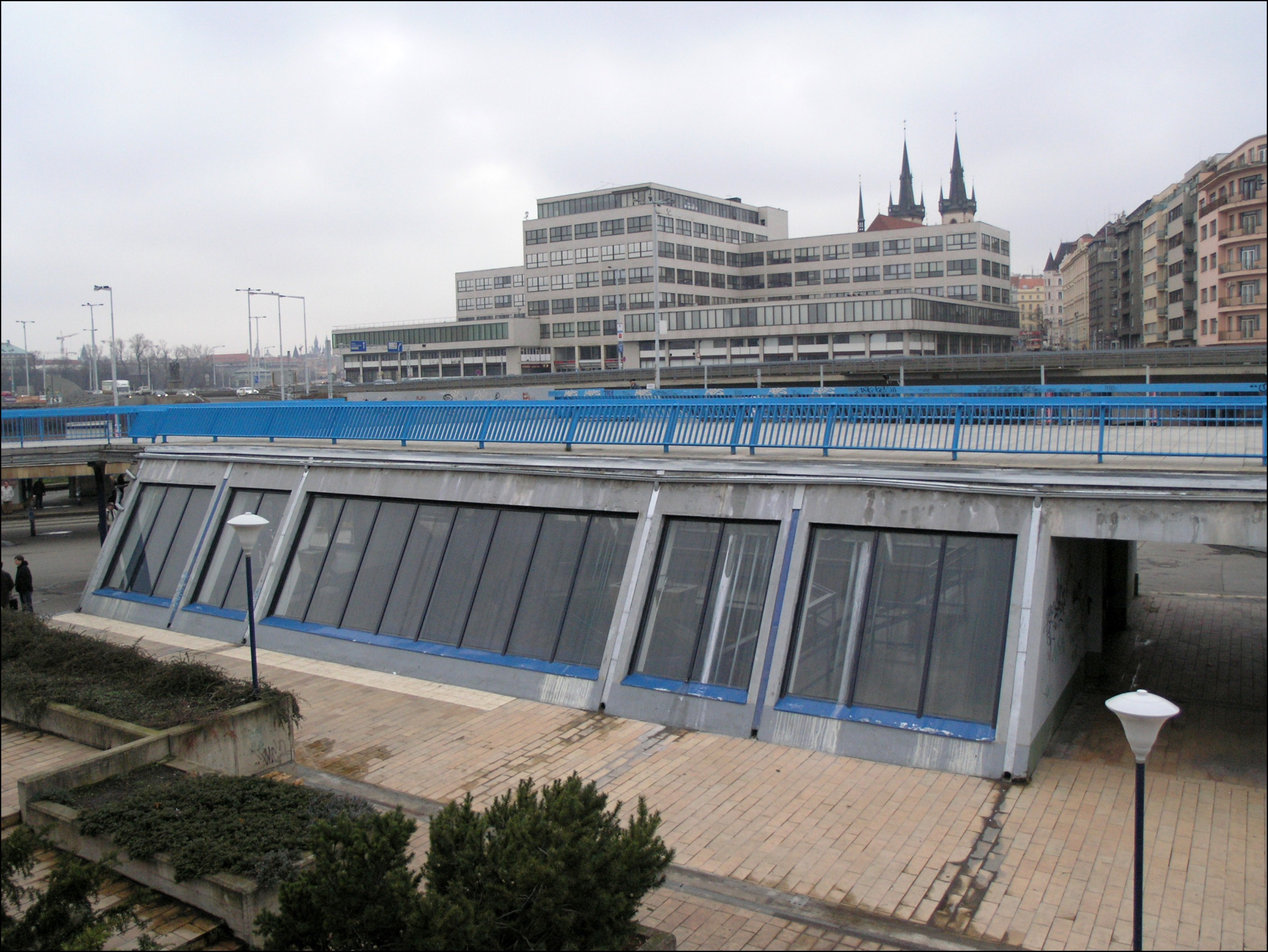 Vstupní vestibul - metro Vltavská, v pozadí KD Vltavská